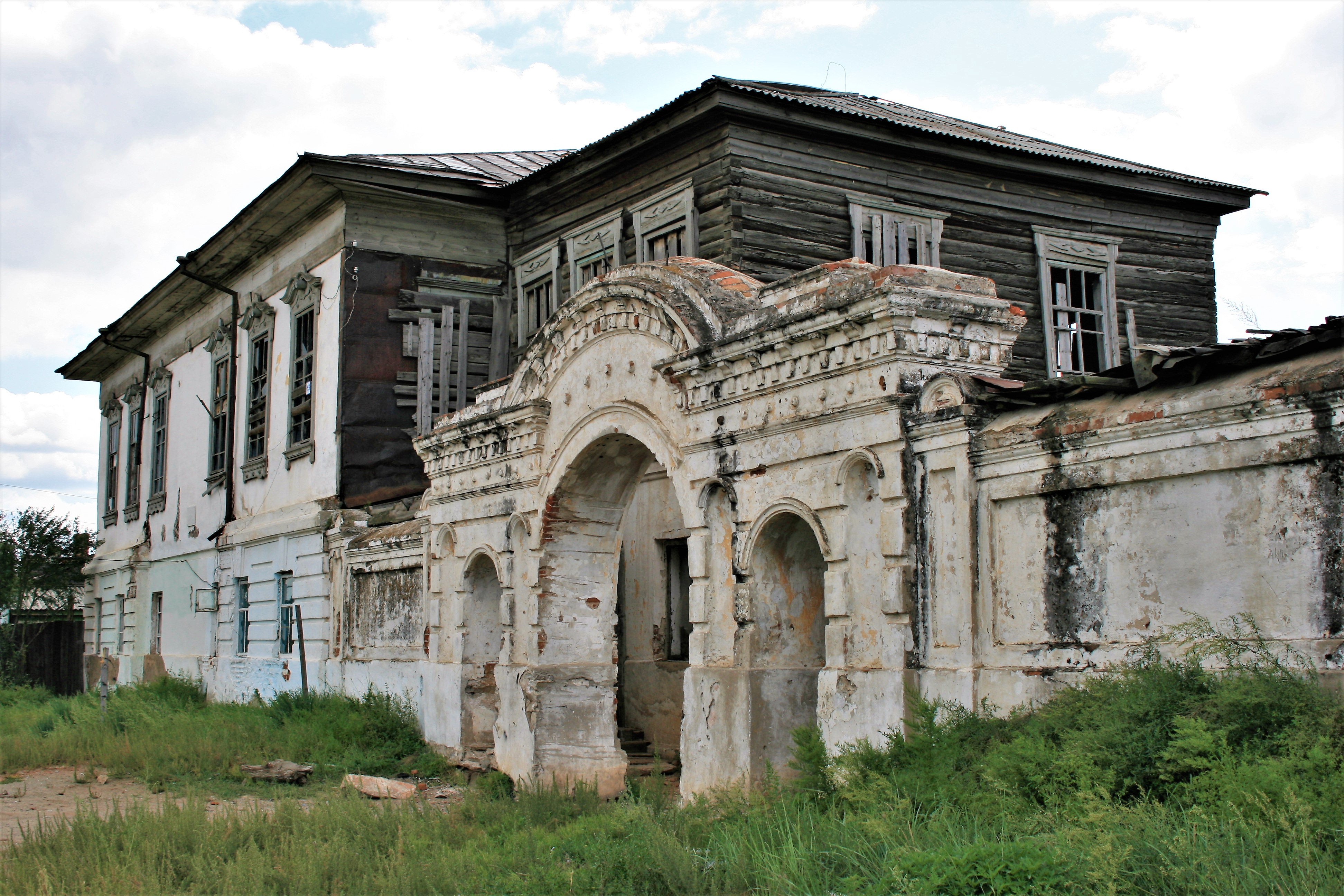 Дом купца Лушникова Кяхта (Бурятия)